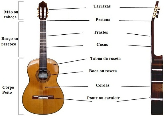 Partes do violão, com descrição em português do Brasil. Imagem original disponível nesta Wiki.